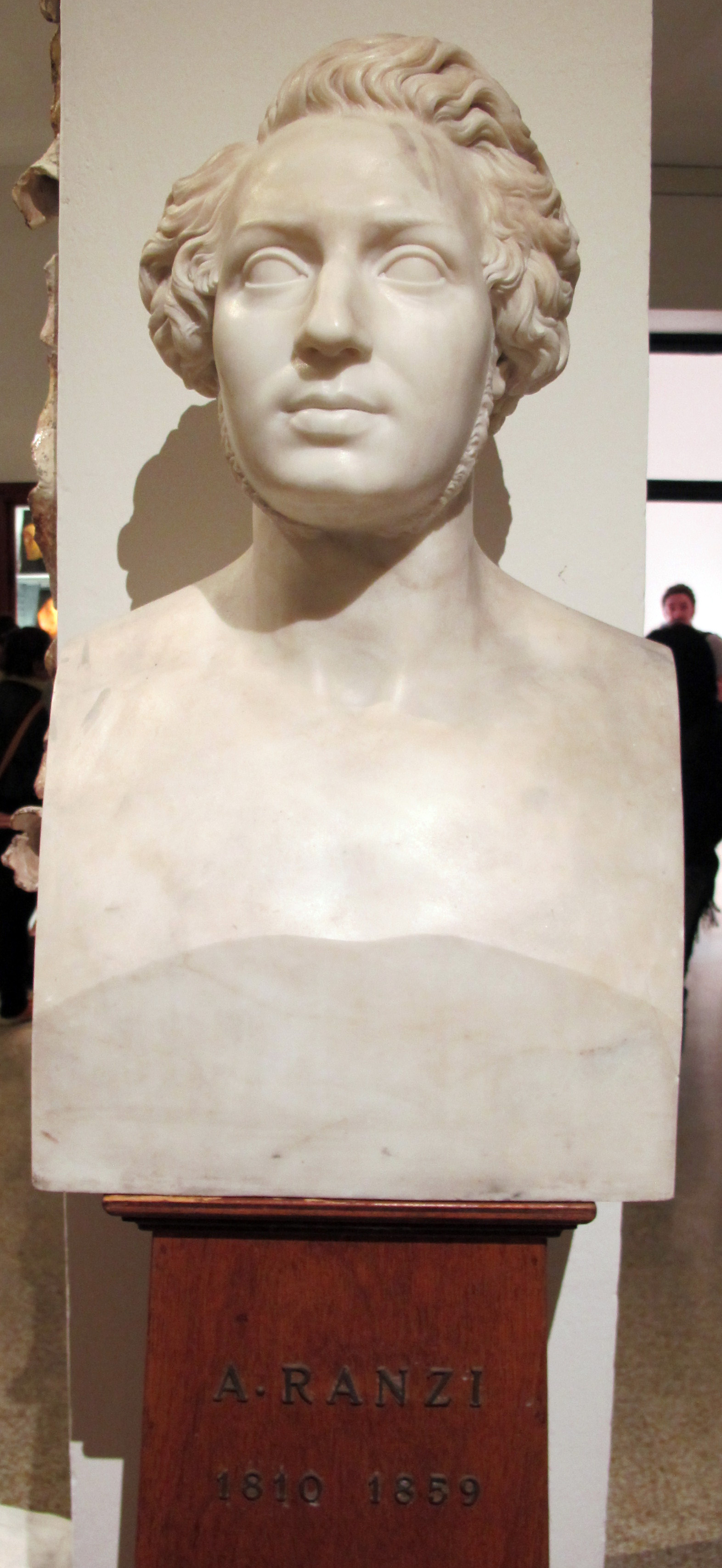 Istituto di anatomia patologica, museo, busto andrea ranzi